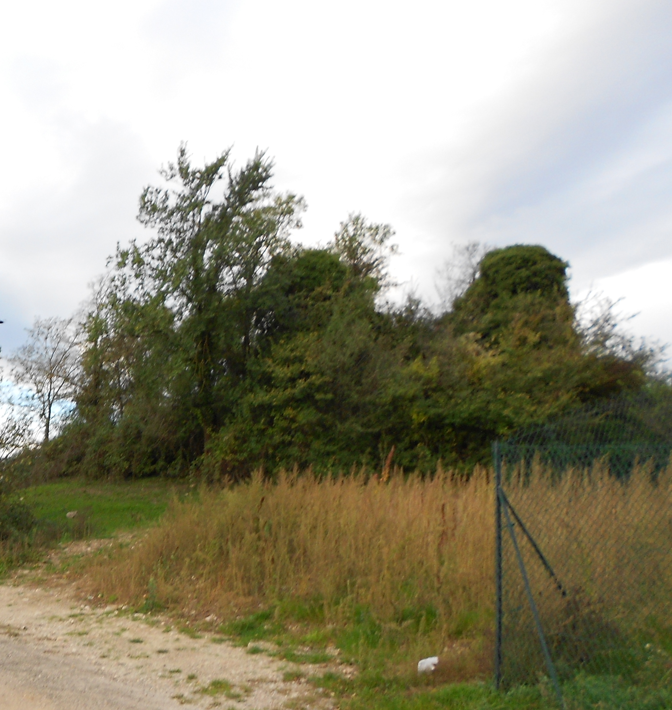 Ruines du donjon du château de Malatrait, à Janneyrias en France